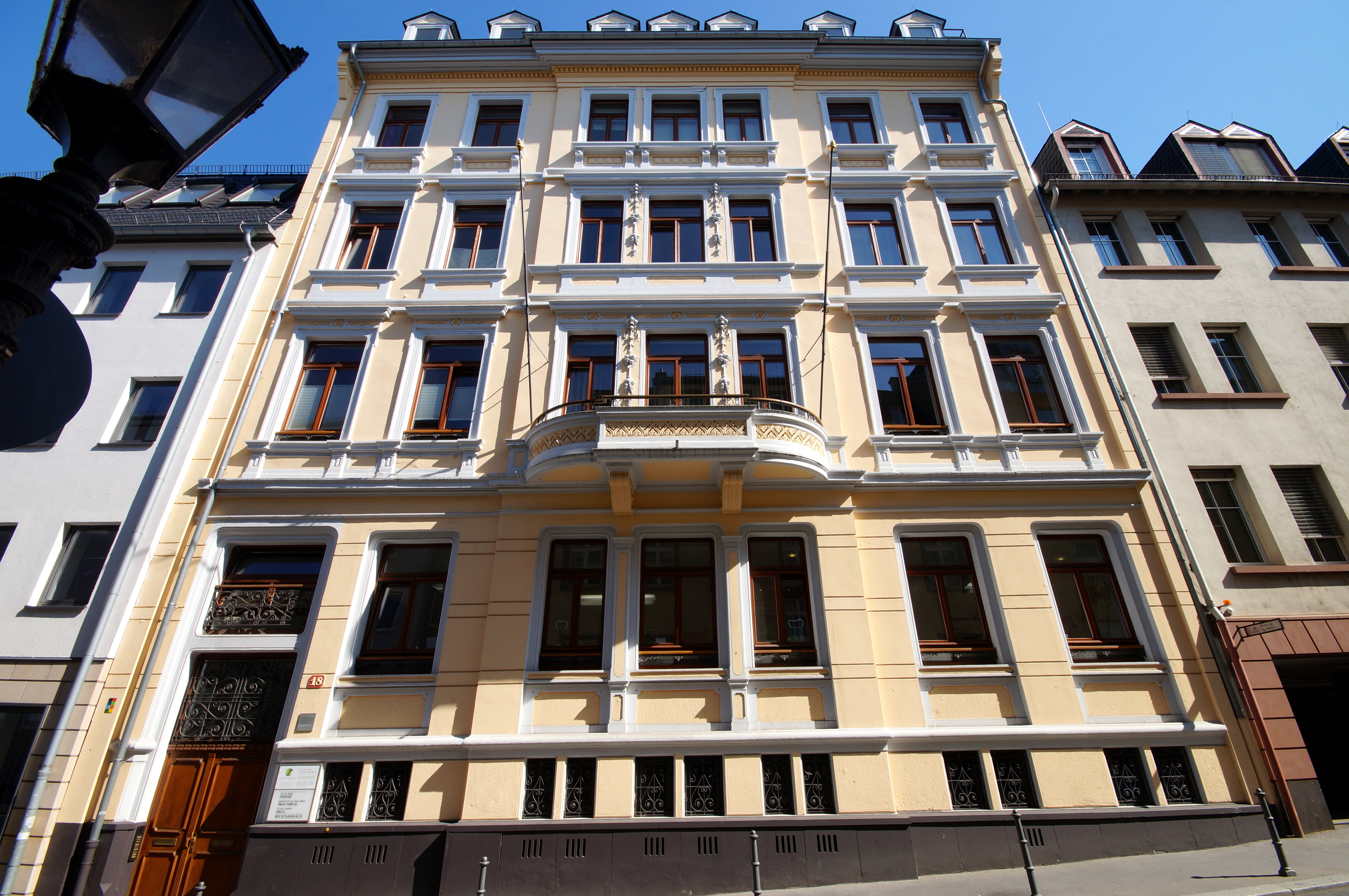 Fassade des Gebäudes Emmerich-Josef-Straße 18 in Mainz-Altstadt